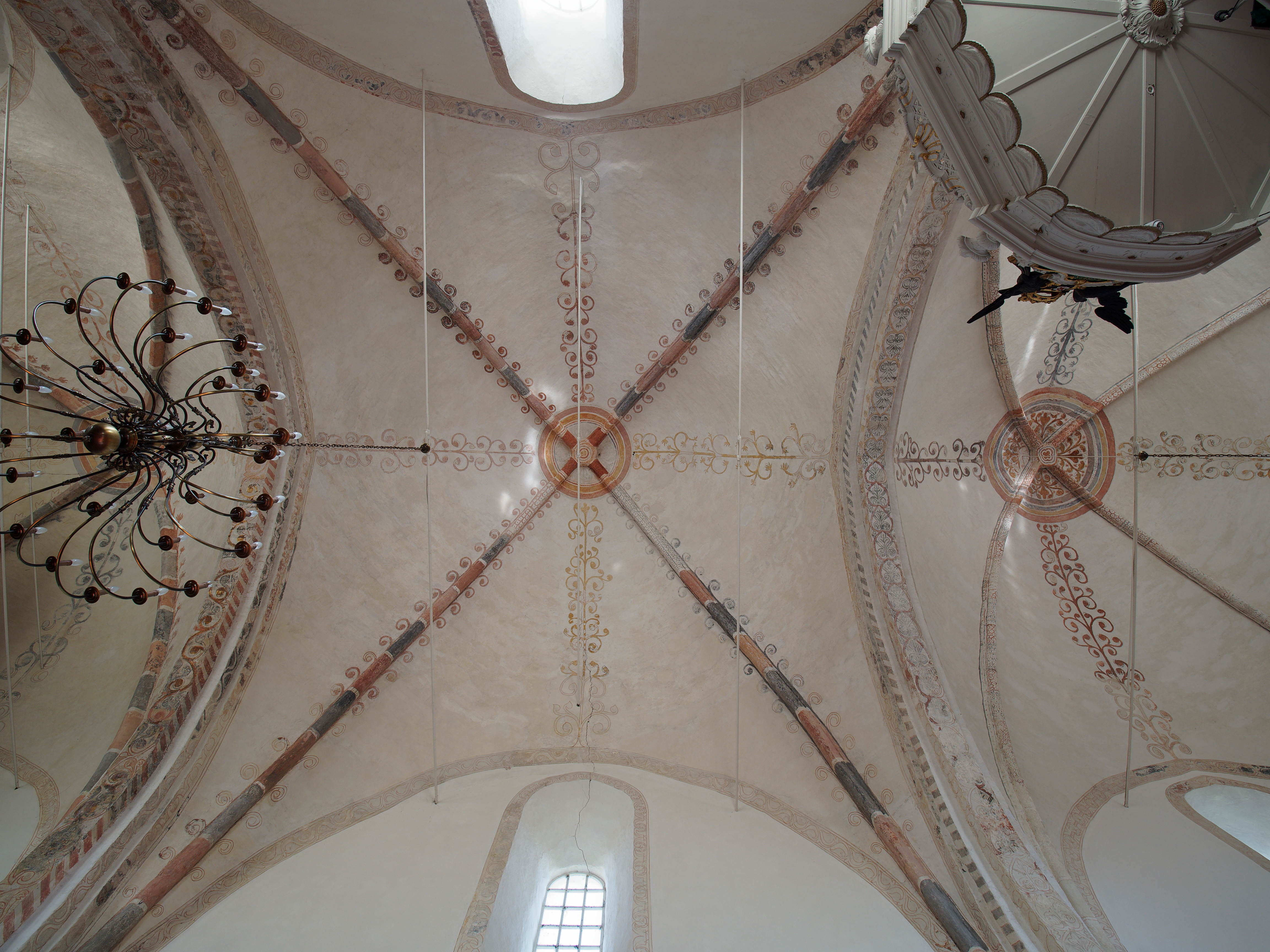 Bemaltes Kreuzrippengewölbe in der ev. reformierten Kirche in Eilsum (Ostfriesland) aus dem 12. Jahrhundert.